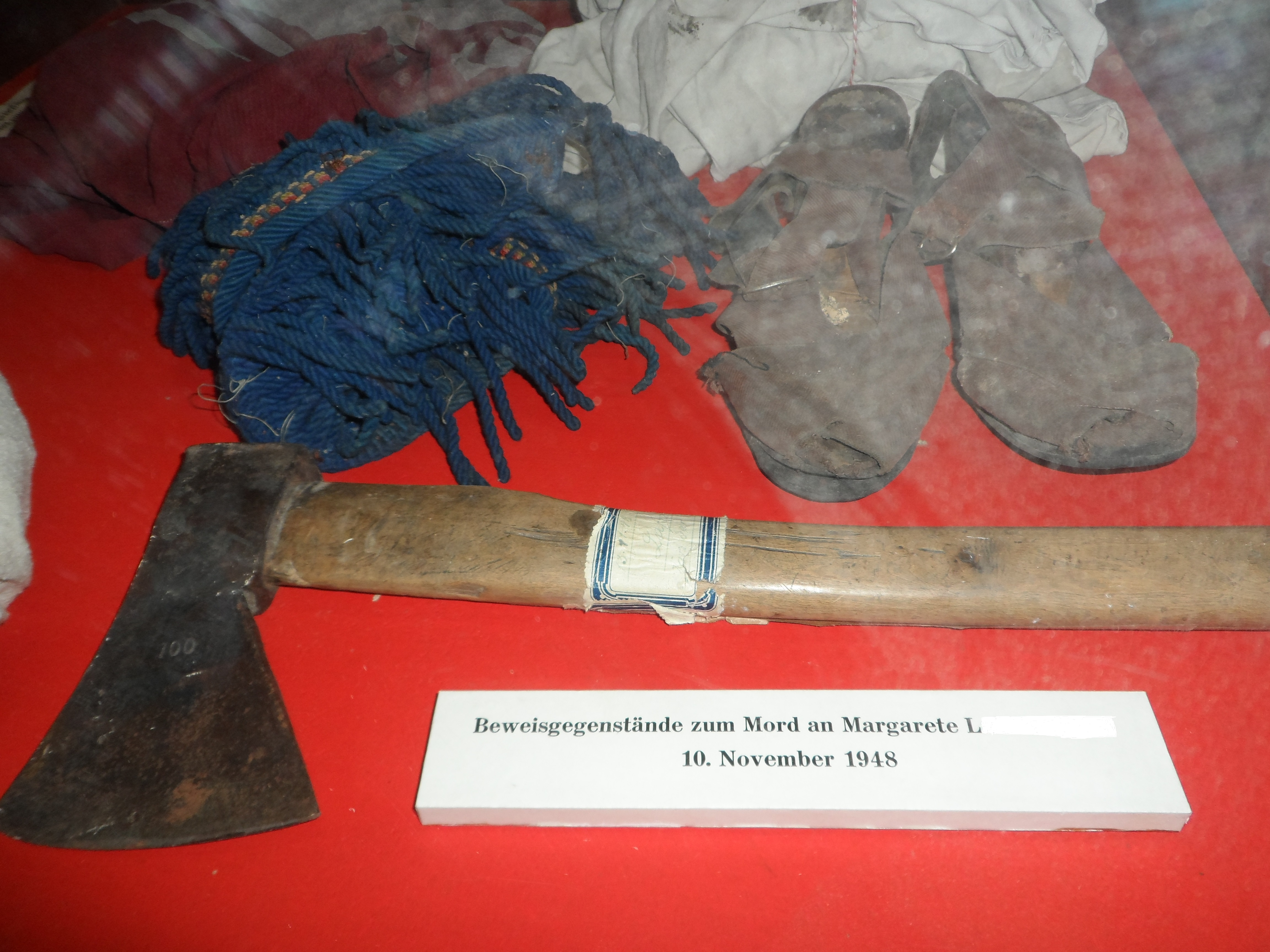 Beweisgegenstände zu einem Mordfall aus Österreich von 1948